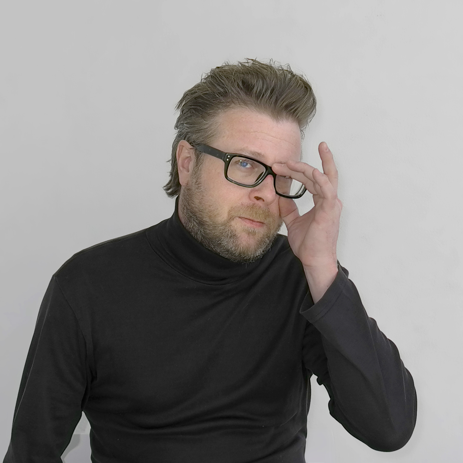 Portrait Künstler Joerg Auzinger